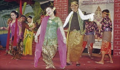 Tayuban di Desa Tegalrejo. Kecamatan Argomulyo, Kota Salatiga.